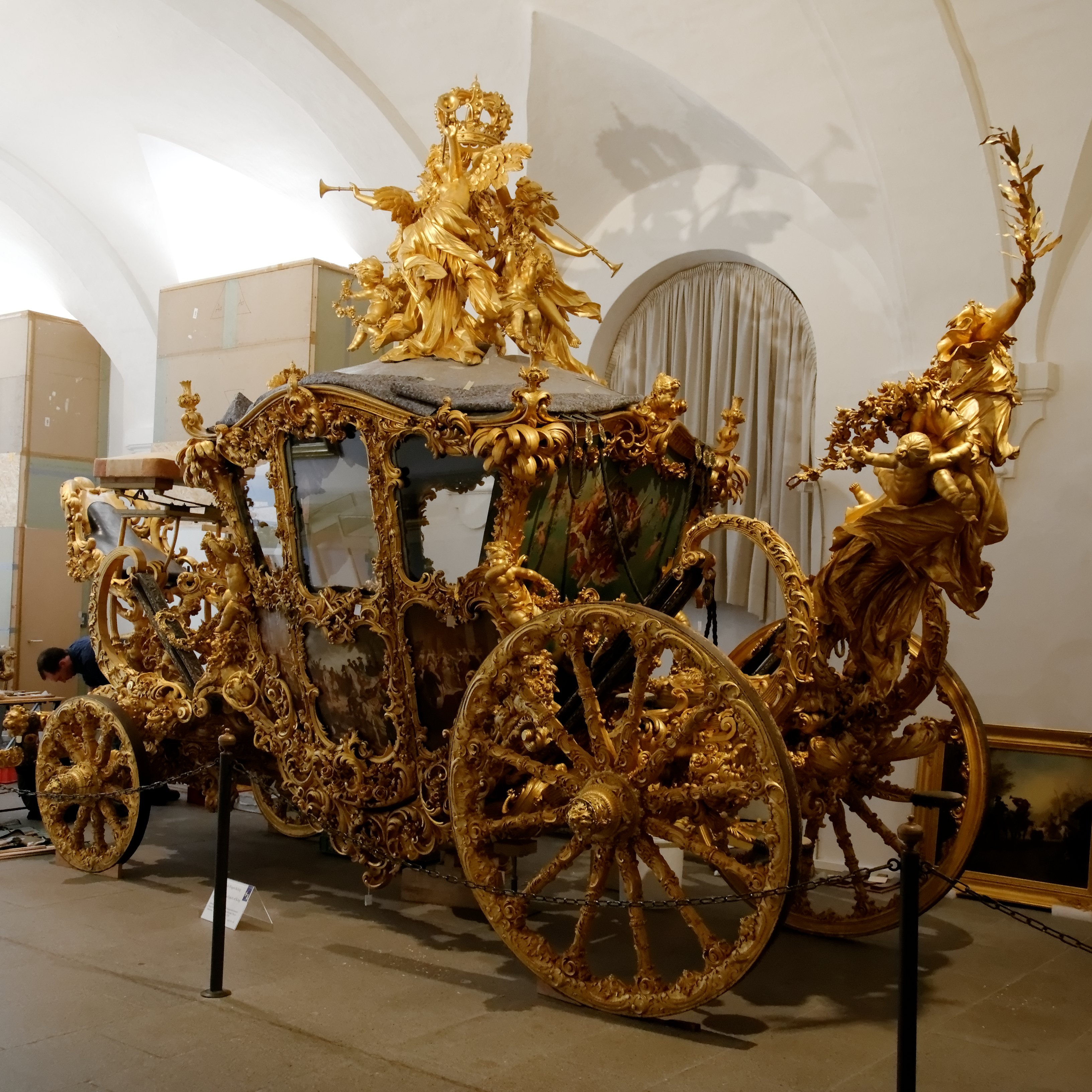 Carrosse d'apparat de Louis II de Bavière (1845-1886). Munich 1870-71. Exposé au Marstallmuseum du château de Nymphenburg à Munich.